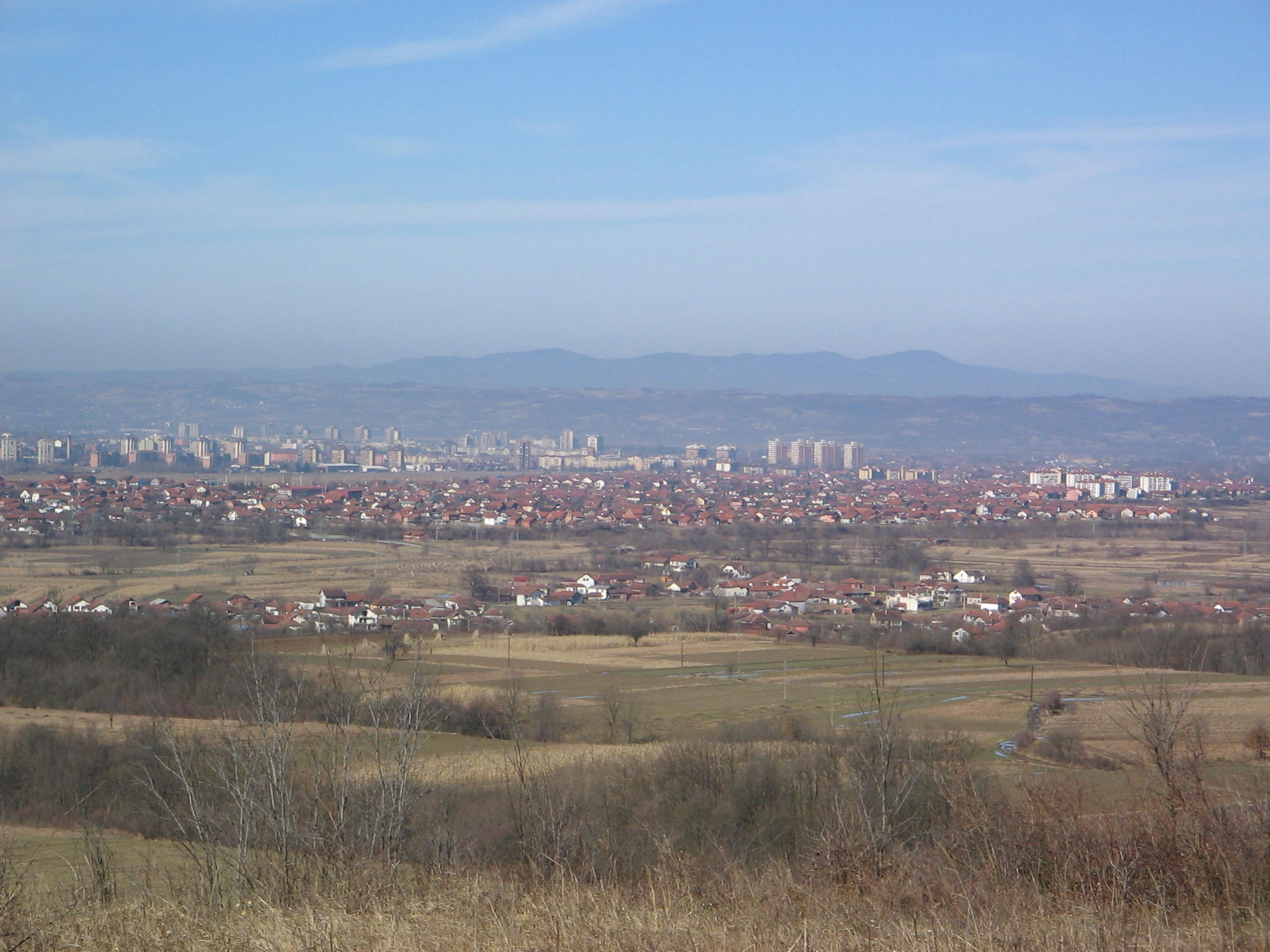 Велико Головоде,град Крушевац и планина Гоч у позадини